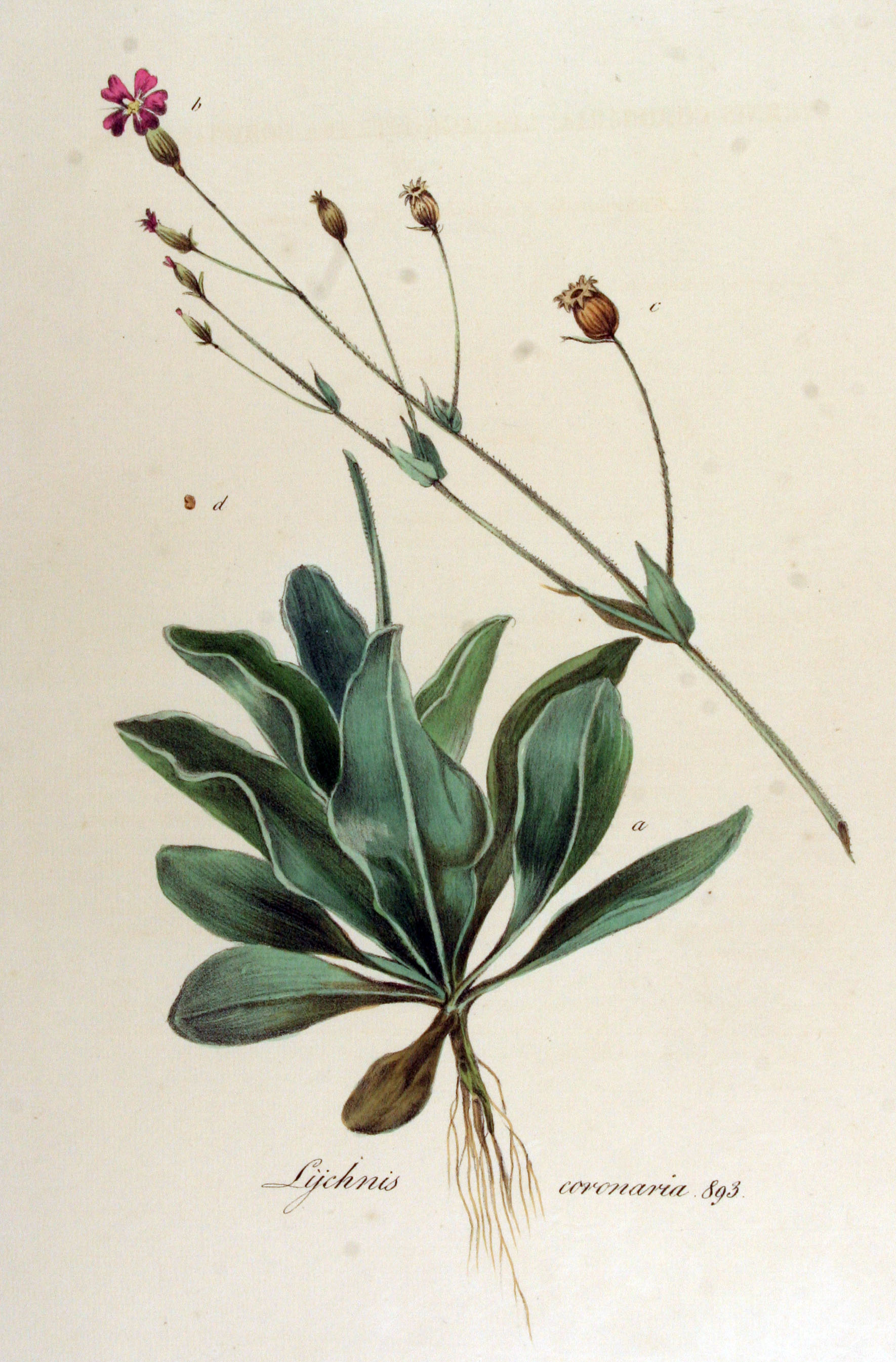 Lychnis coronaria (L.) Desr.